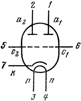 Двойной триод